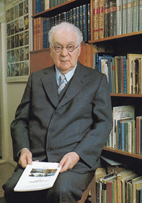 luonnonsuojelija